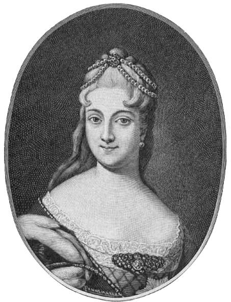 Екатерина Алексеевна Долгорукая, невеста Петра II. Гравюра. Около 1730. Гос. Эрмитаж.